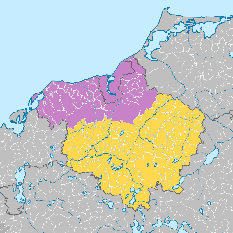 Karte der Amtsgerichtsbezirke im Landgerichtsbezirk Rostock nach Umsetzung der Gerichtsstrukturreform zum 11. Mai 2015 Amtsgericht Rostock Amtsgericht Güstrow